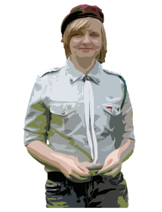 Umundurowanie Szczepu Halny - biała chusta i pagony